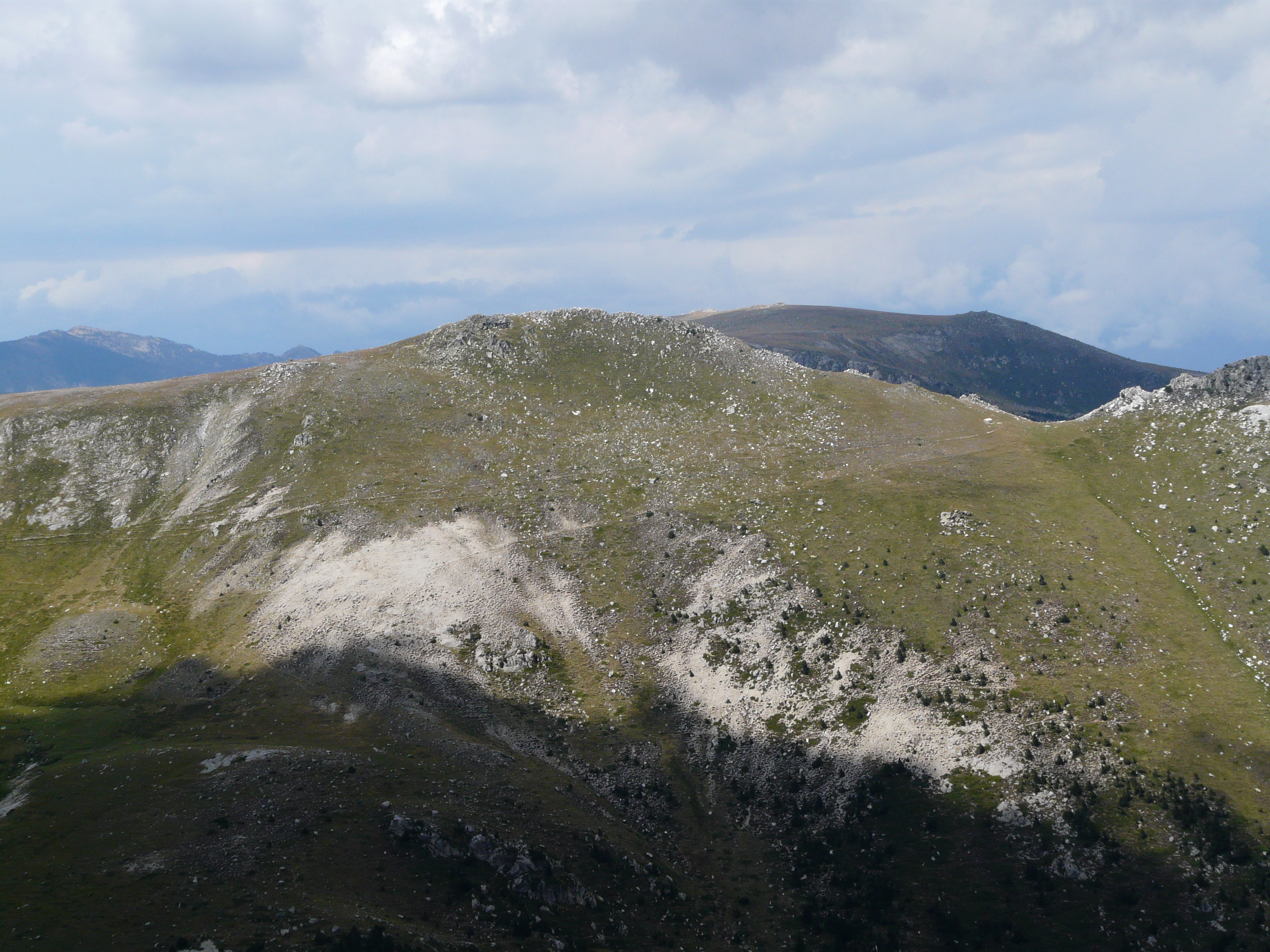 Fotografia presa en una pujada al Costabona des de la Collada Fonda.